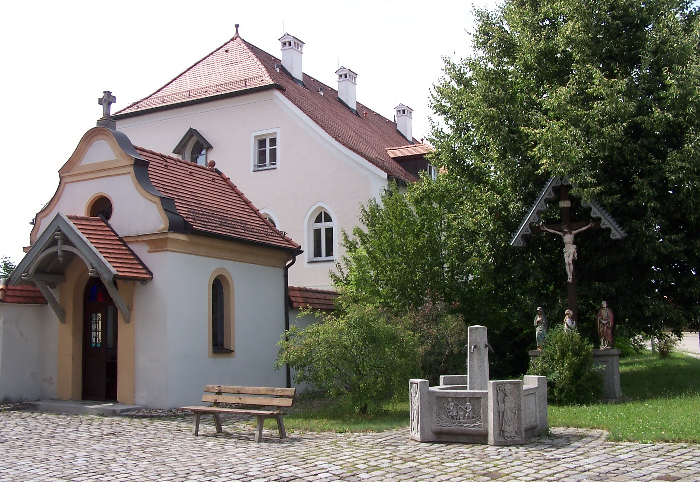 Kirchroth, Niederachdorf, Pilgerstraße 25. Ehem. Kloster des Maristenordens, heute Wohn- und Pflegeheim, mit Halbwalmdach, Ende 18. Jh.